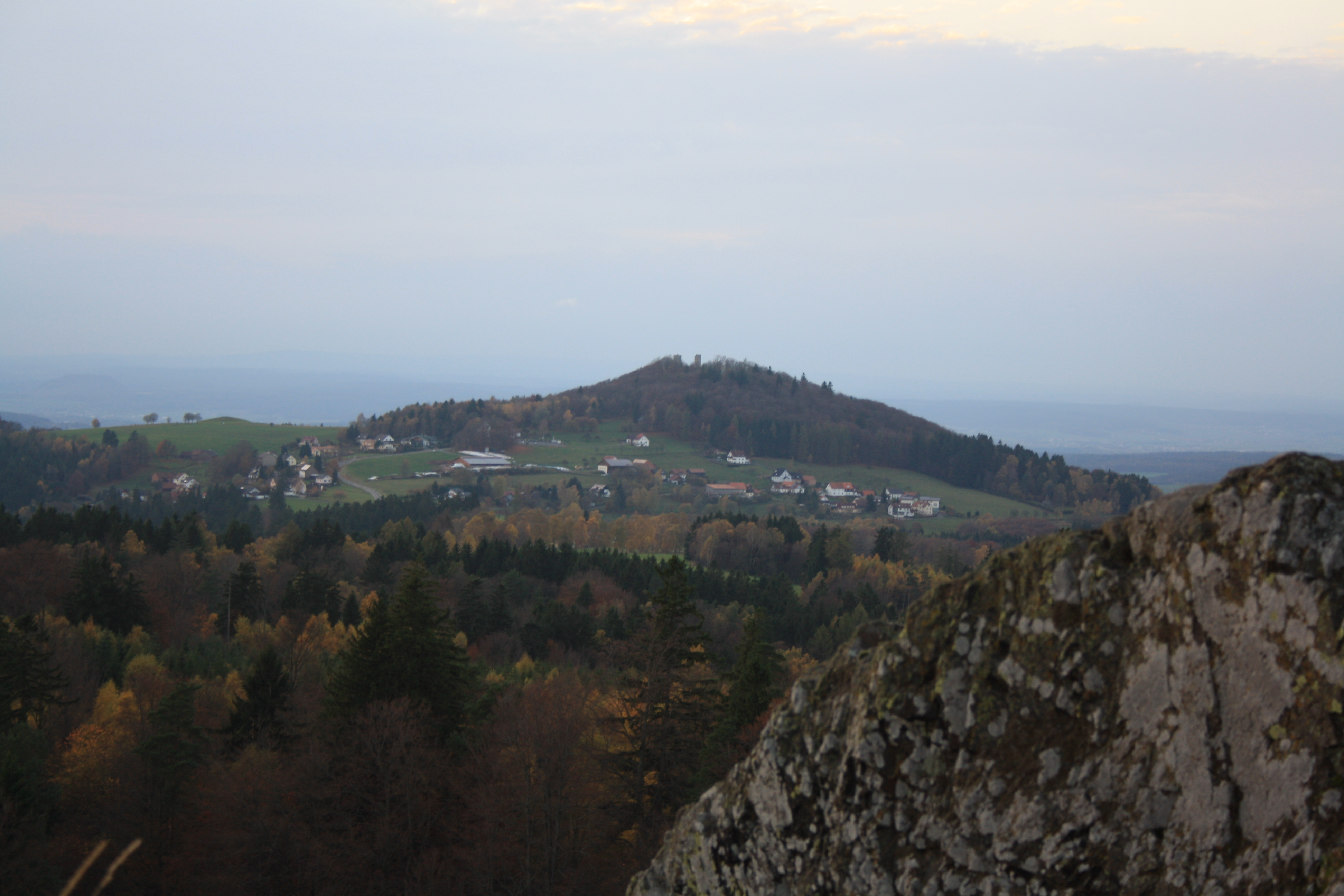 Blick auf Rabennest und den Ebersberg vom Wachtküppel